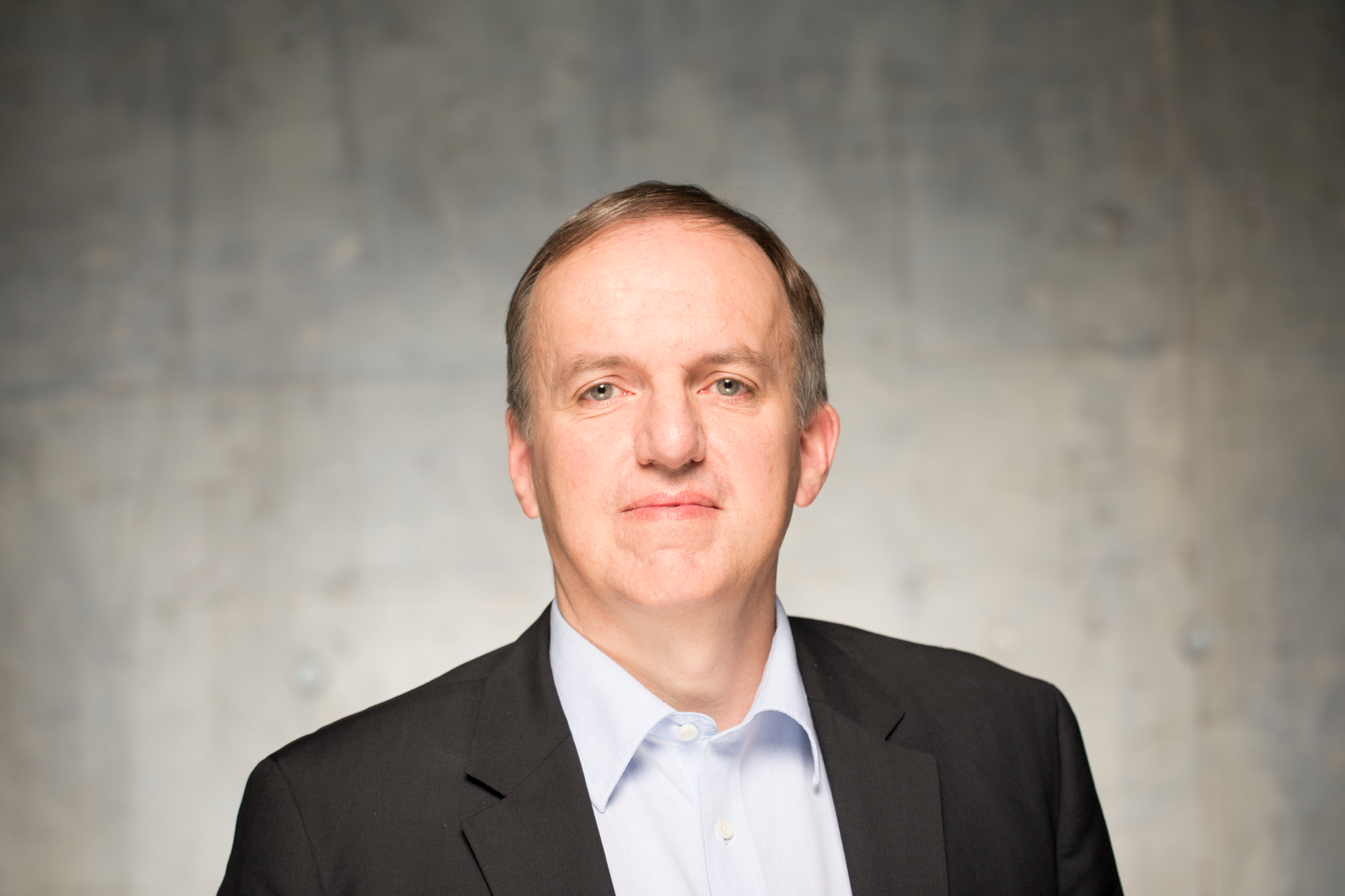 Bild von Professor Dr. Gerd Nufer aus 2017 an der HS Reutlingen